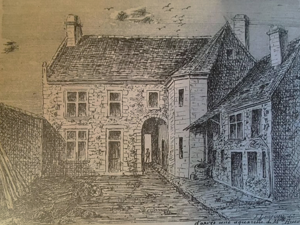 L'hotel Mauduison au 89 rue Dorée à Nogent le Retrou